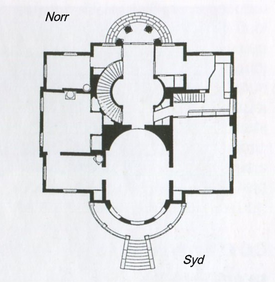 Planritning till villa Listonhill på Djurgården